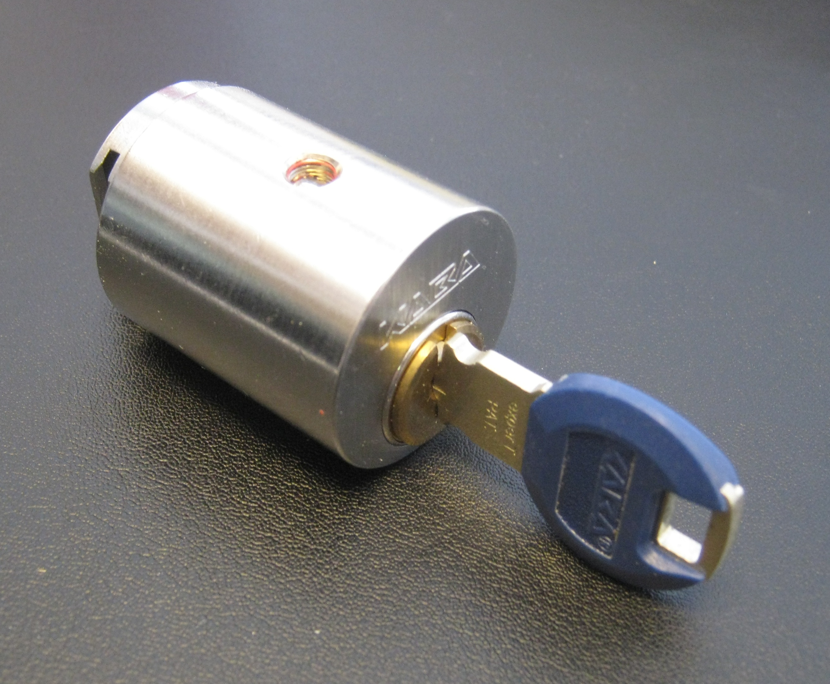 Kaba sylinderlås med nøkkel